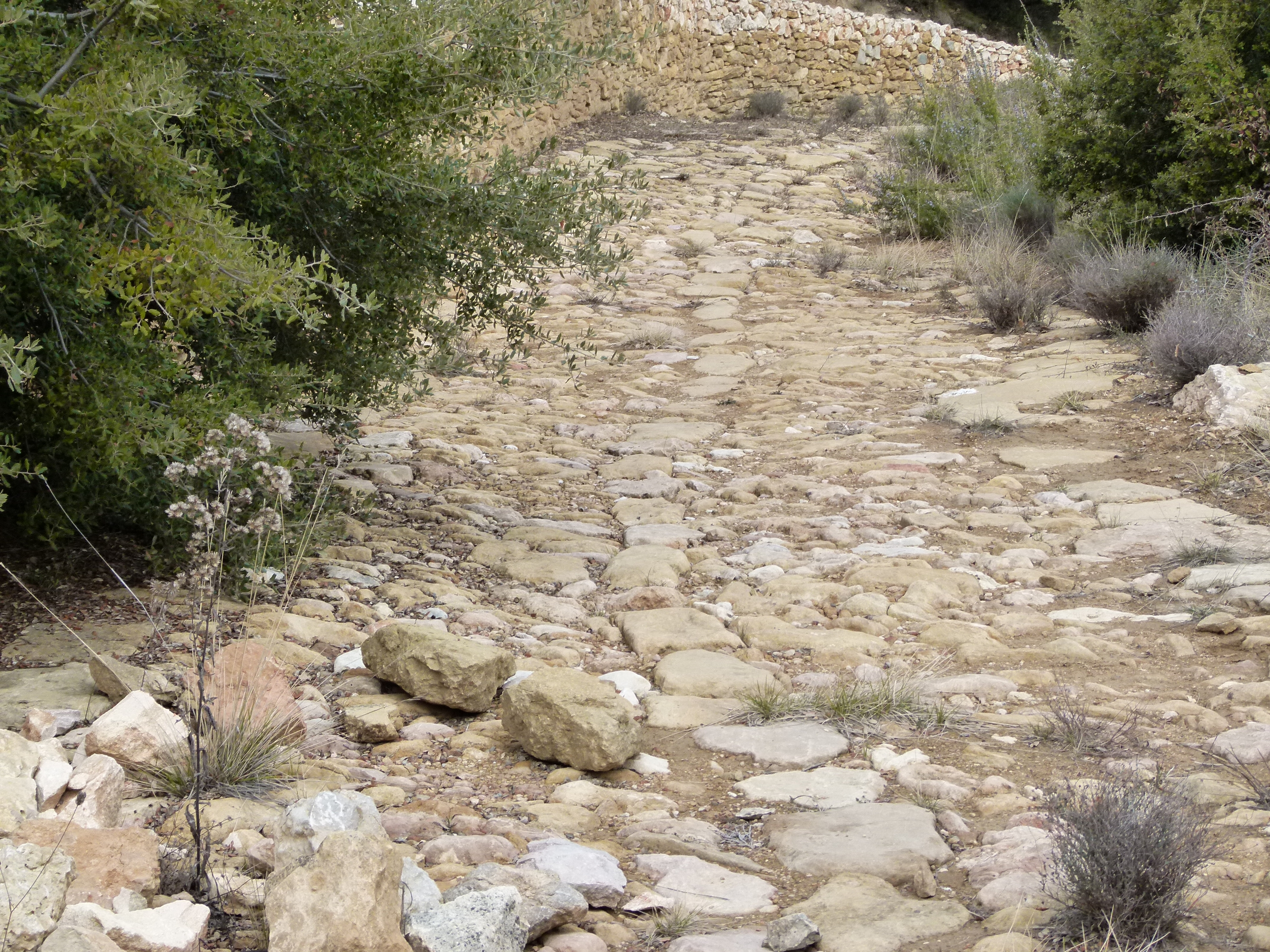 Via romana a Àger (La Nogera, Catalunya)